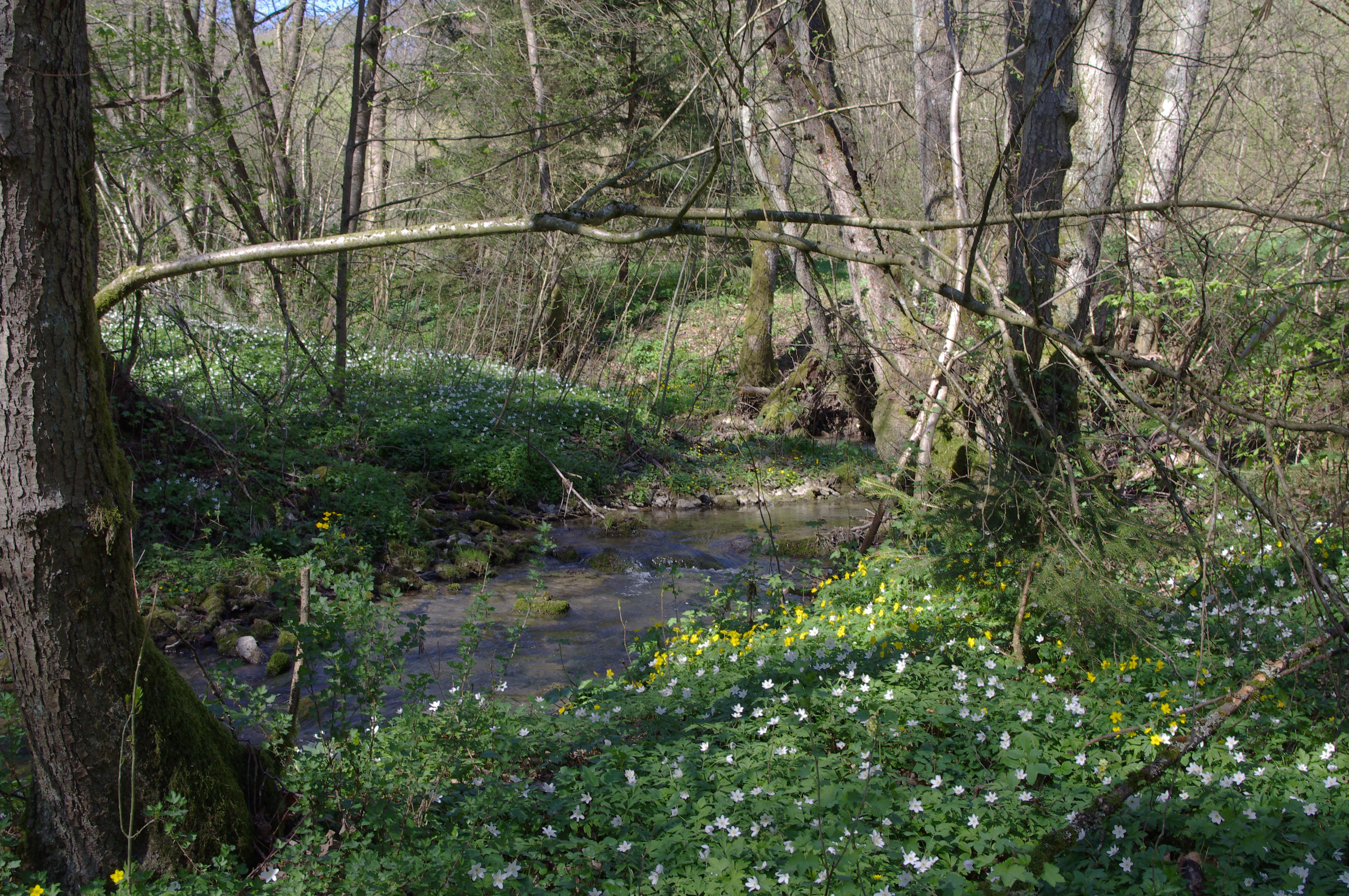 le Fischbach